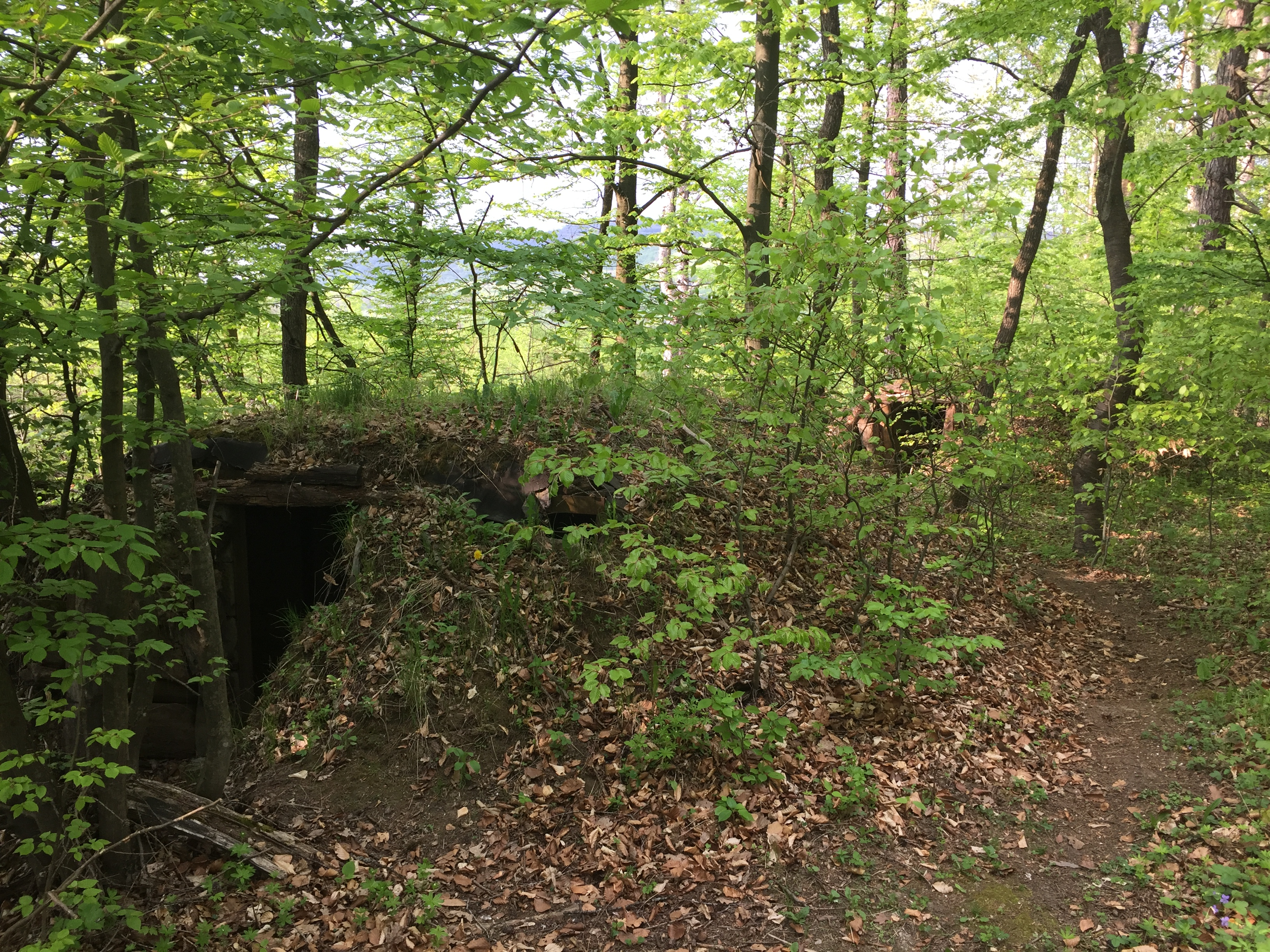 Pozostatky z bojiska /bunker/